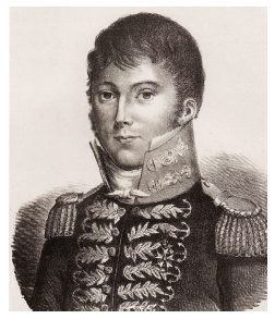 Pierre-Henri Philibert